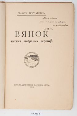 Музей: Літаратурны музей Максіма Багдановіча Тып: пісьмовыя крыніцы Від: друкаваныя выданні Прадметнае імя: кніга Назва/аўтарская назва: "Вянок" Аўтары: Багдановіч Максім Адамавіч; Калектыўныя аўтары: Друкарня Марціна Кухты; Матэрыялы: папера; Тэхналогіі стварэння: друк; Дата стварэння: 1913 г. Месца стварэння: Расійская Імперыя, Вільня Памеры: 19,8 х 14,4 см